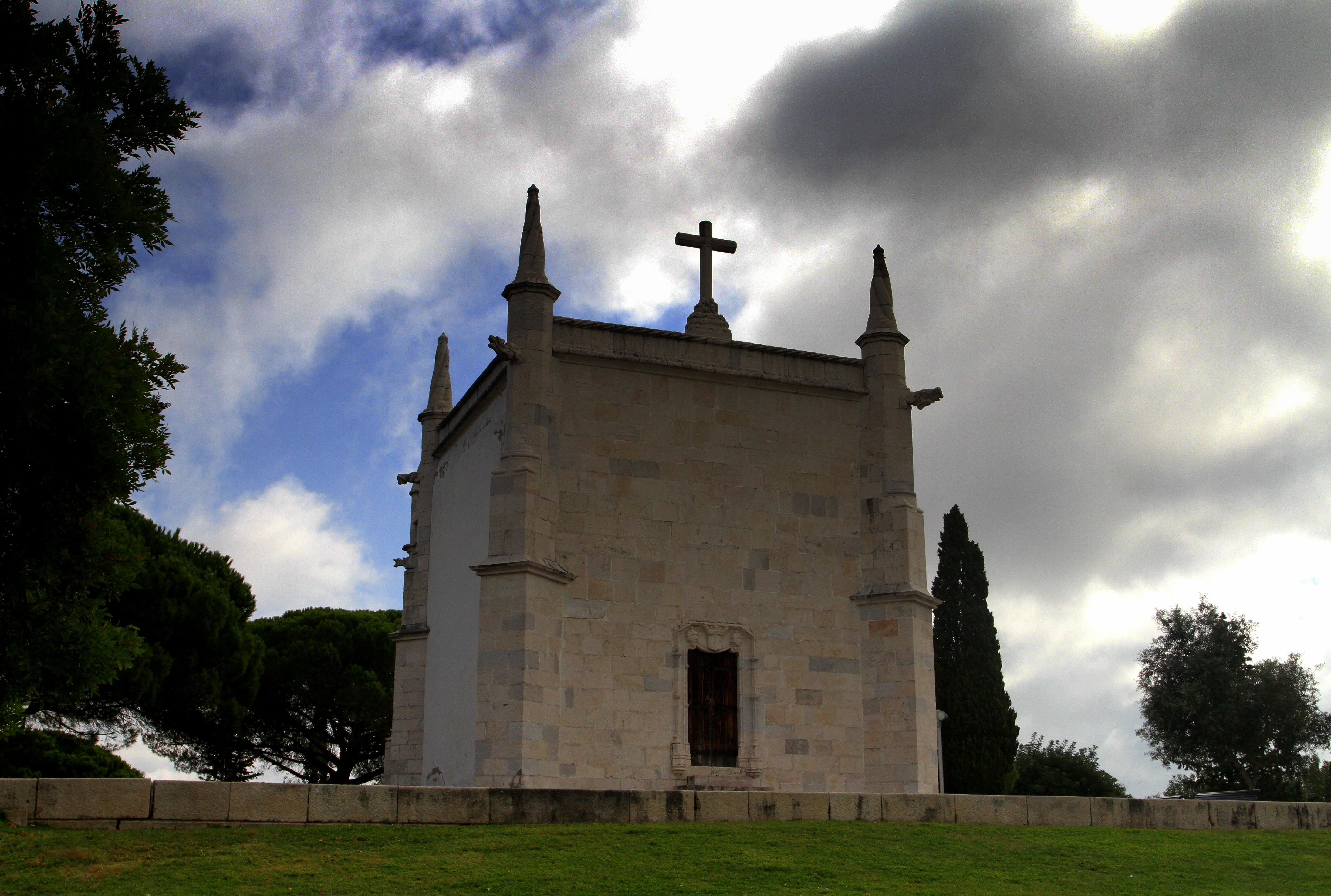 Ermida do Restelo This file was uploaded for Wiki Loves Monuments in Portugal with the unique identifier 70633.